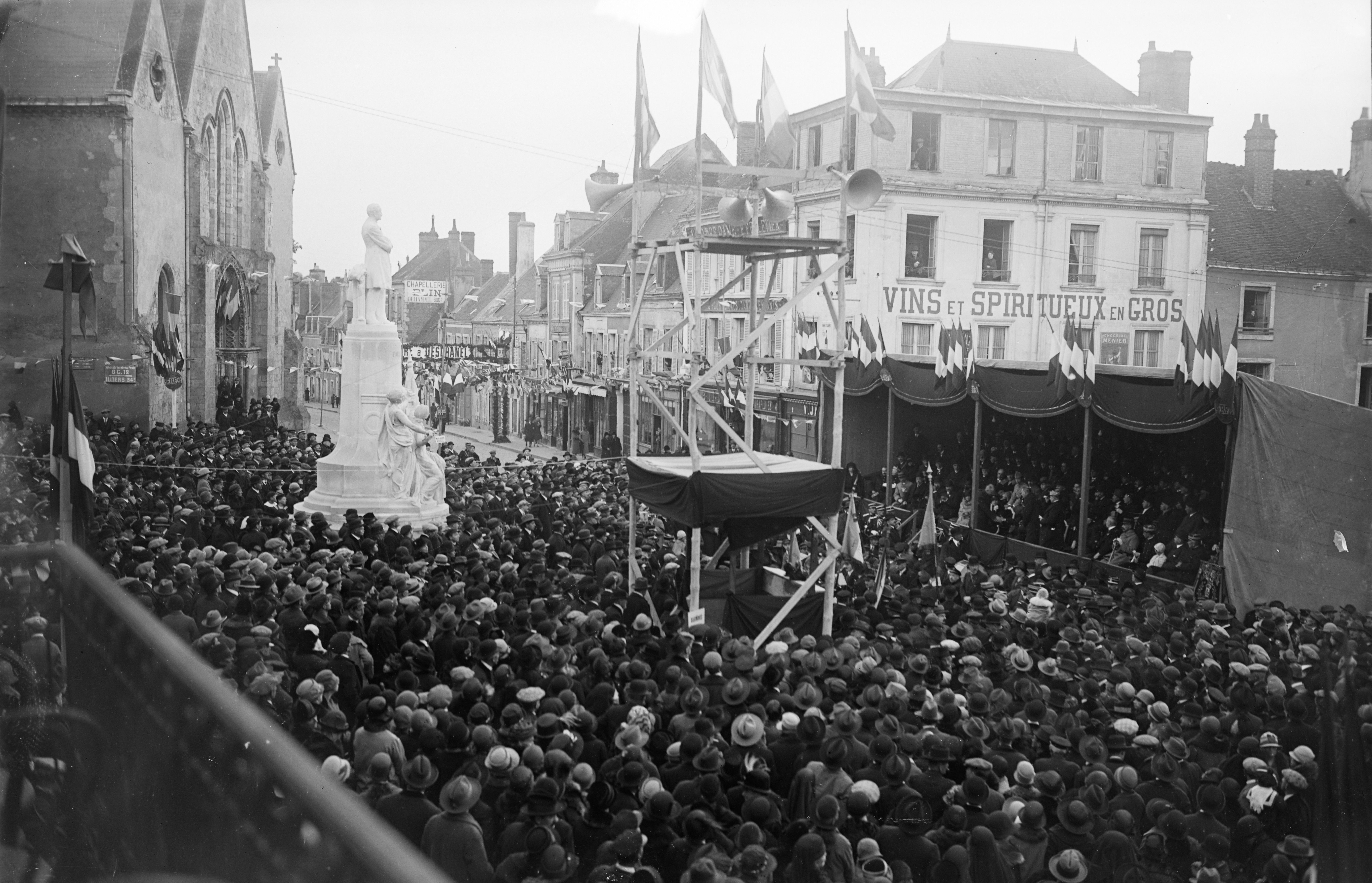 Inauguration d'une statue représentant Paul Deschanel à Nogent-le-Rotrou (place Saint-Pol), en présence notamment de Raoul Péret, de Louis Barthou et du général Lasson.